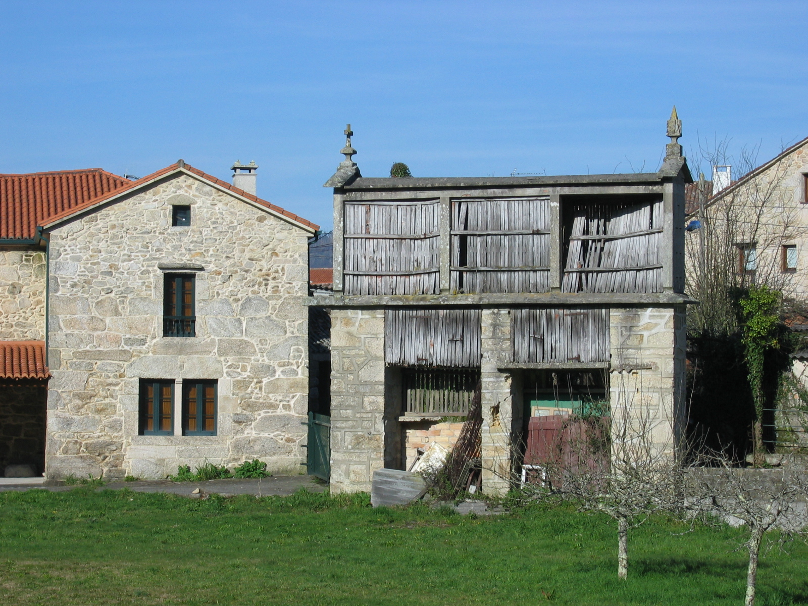 Hórreo no lugar de Larañiño, parroquia de Laraño, Concello de Santiago de Compostela.